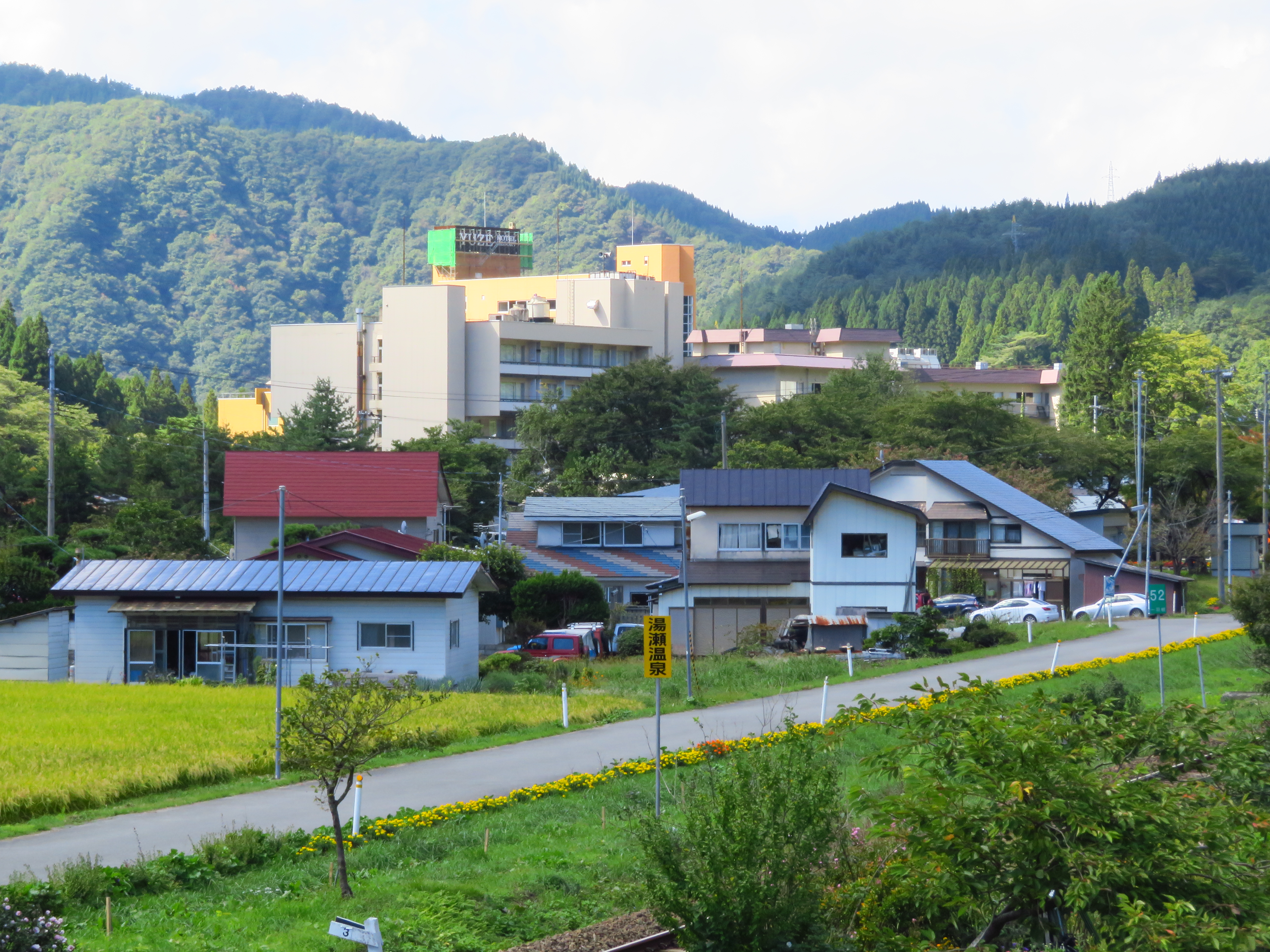 湯瀬温泉：秋田県鹿角市 Canon PowerShot SX720 HS